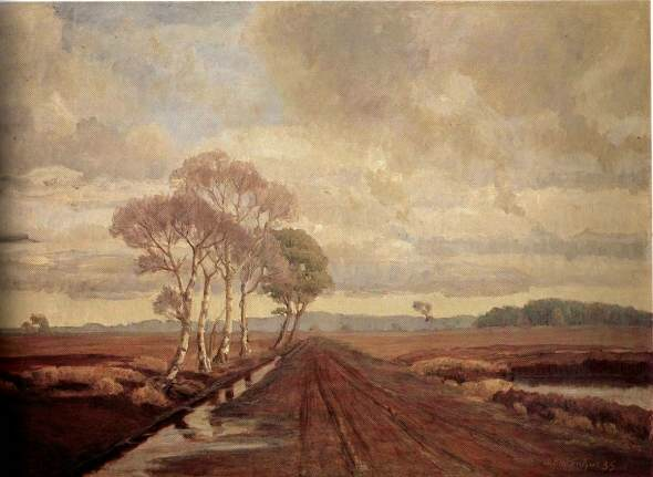 Birkenweg im Moor. Öl auf Sperrholz. Stadtmuseum Oldenburg